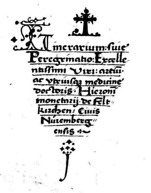 Beginn der Abschrift von Hieronymus Münzers Reisebericht durch Hartmann Schedel Clm 431, Bl. 96r